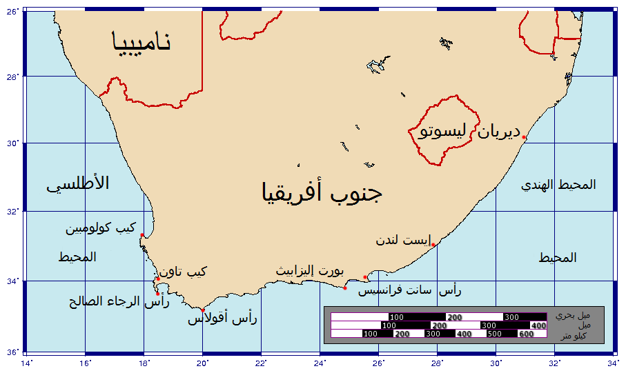 خريطة تبين موقع رأس الرجاء الصالح ورأس أقولاس.